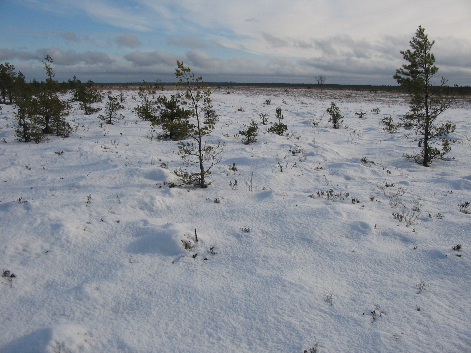 Talvine Linnuraba lõunaserv. Tagaplaanil madalsoo.